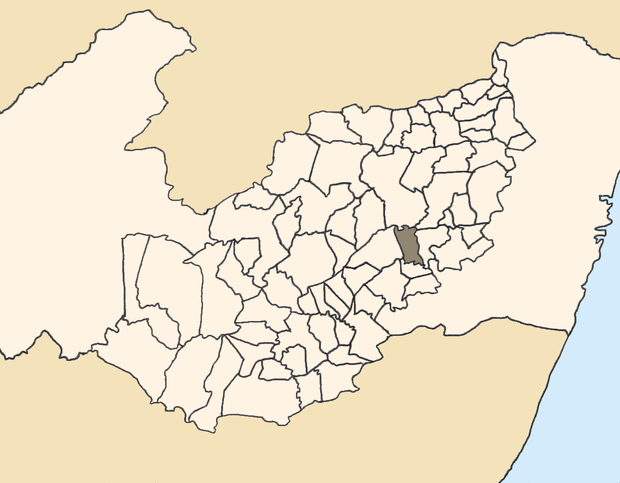 Mapa da mesorregião Agreste de Pernambuco (Brasil) subdivida em municípios. Em destaque, o município de Agrestina. Map of the brazilian state of Pernambuco (mesorregião Agreste) showing the city of Agrestina. Imagem tratada com o GIMP. Image made with GIMP.